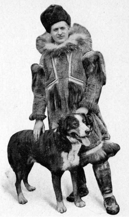 Scotty Allan (1867-1941), musher en Alaska.